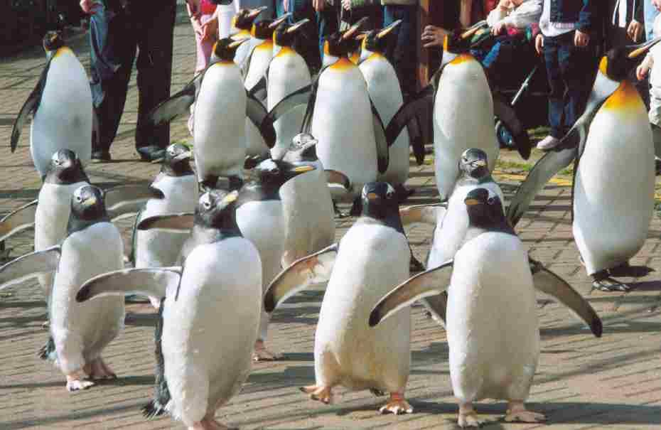 Pinguinmarsch in Edinburgh Fotograf: M.Zibelius, Zoo Edinburgh, GNU FDL erteilt Sieht nach Königspinguinen aus.